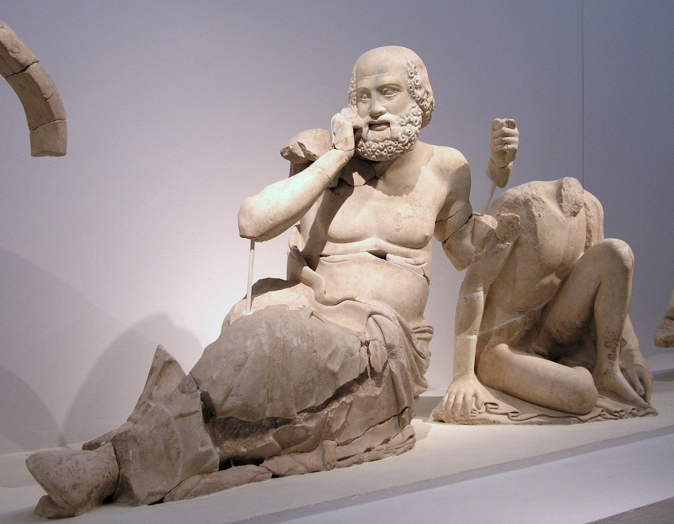 Figuren des Ostgiebels (2)